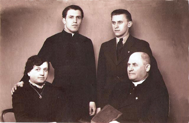 Ortutay Jenő és családja Ortutay Jenő (jobbra lent) és felesége, Papp Ilona. Hátul fiaik Ortutay Béla (jobbra) és Ortutay Elemér. A kép valószínűleg 1935 és 1945 között Beregszászon készült.